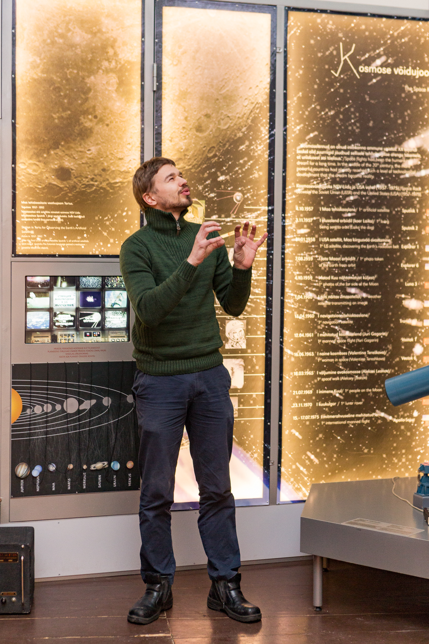 Teadusfoto 2015 lõpetamine Tartu Tähetornis.